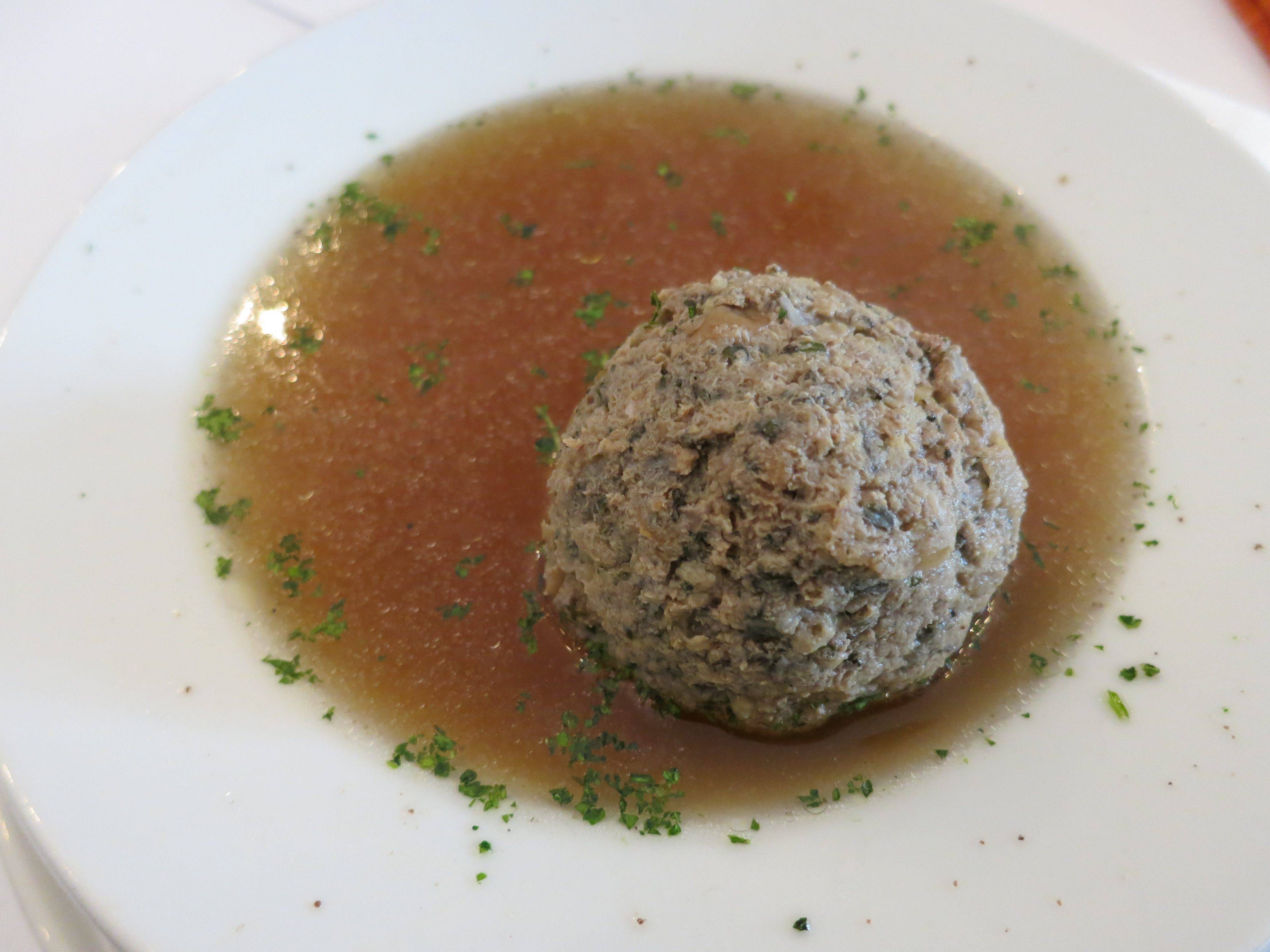 Leberknödelsuppe